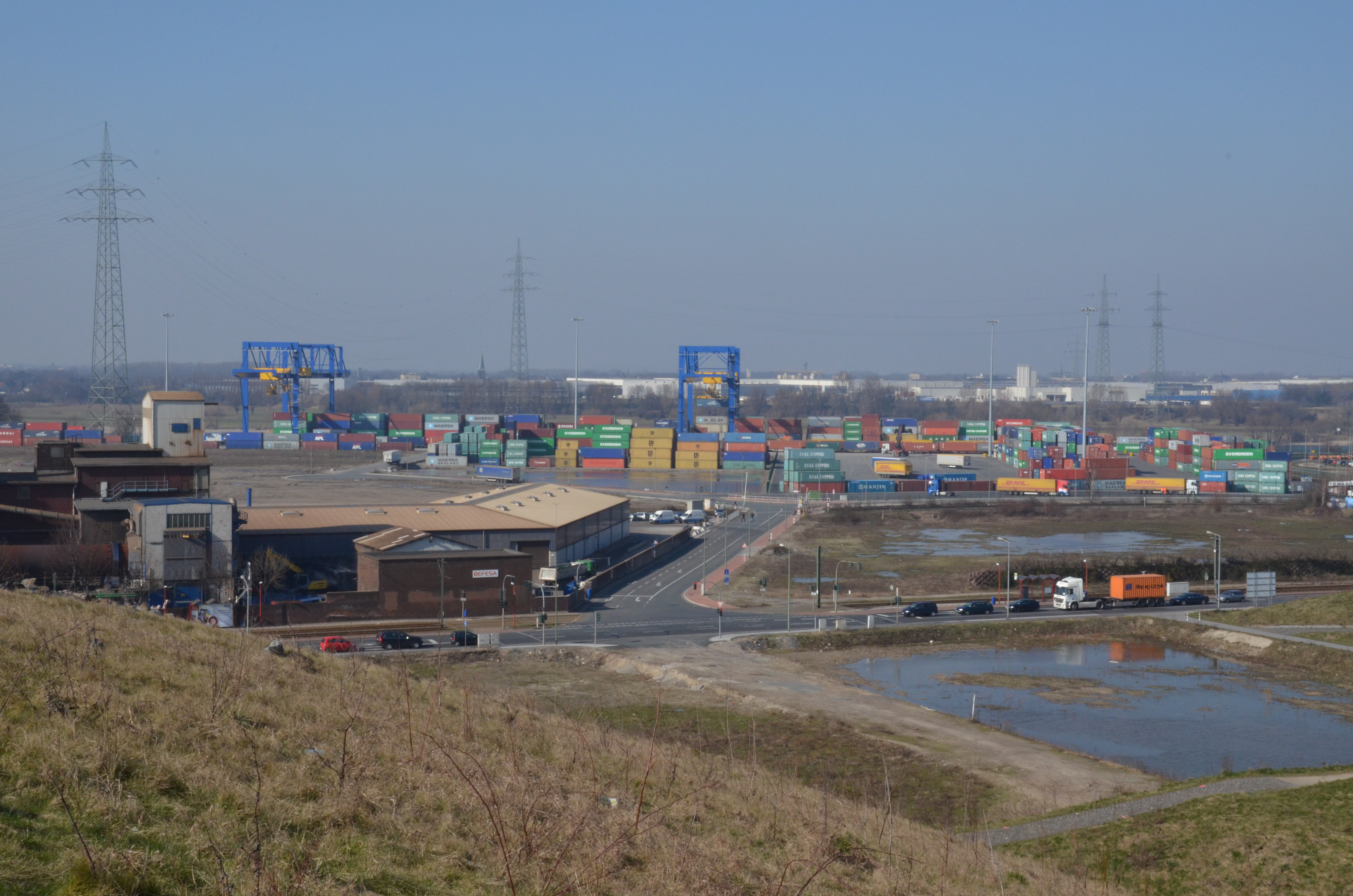 Ausblick von der Heinrich-Hildebrand-Höhe im Angerpark in Duisburg-Angerhausen; die beiden Masten in der linken Bildhälfte bilden die Rhein-Freileitungskreuzung Duisburg-Wanheim